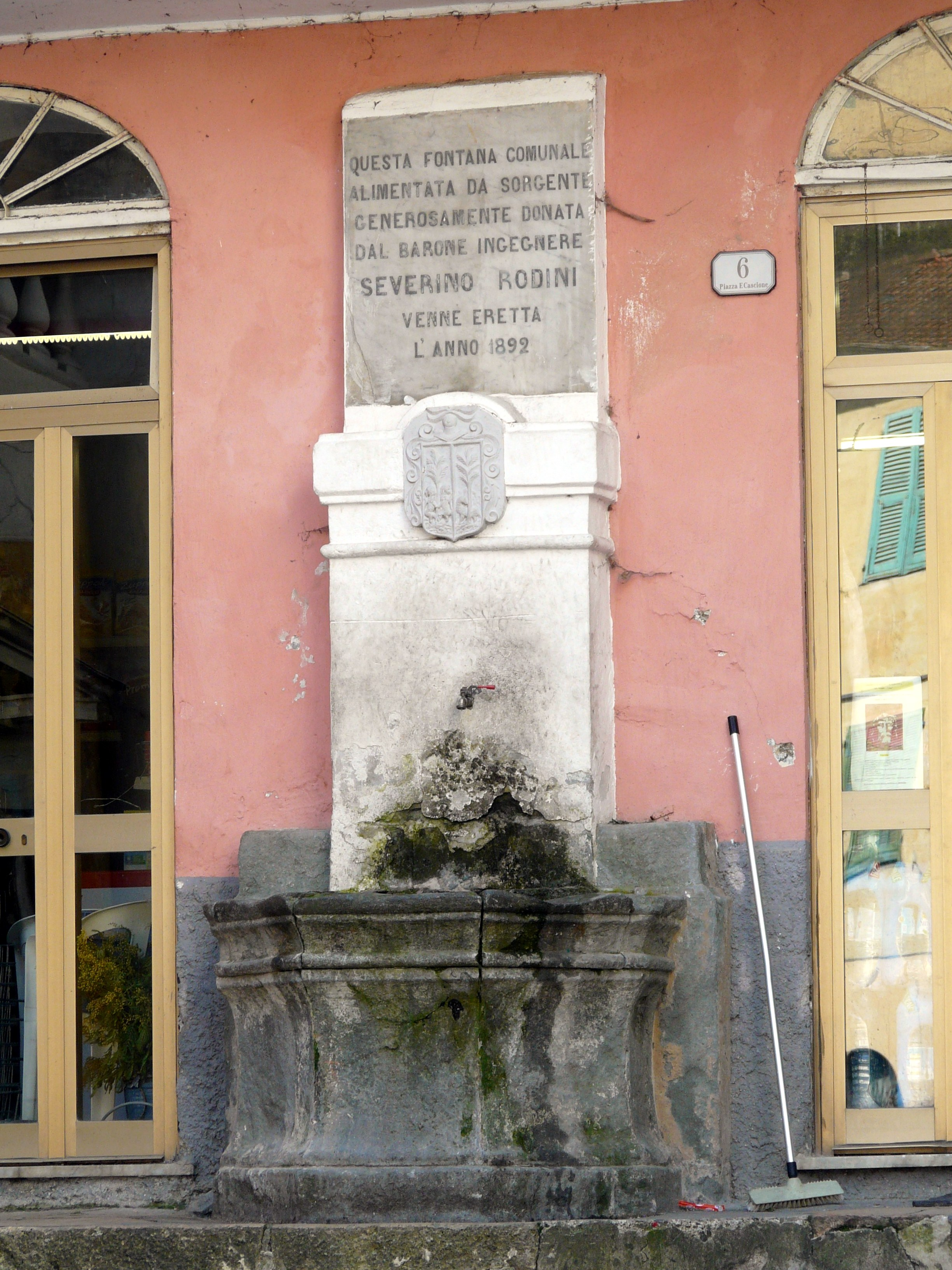 Fontana, Borgomaro, Liguria, Italia